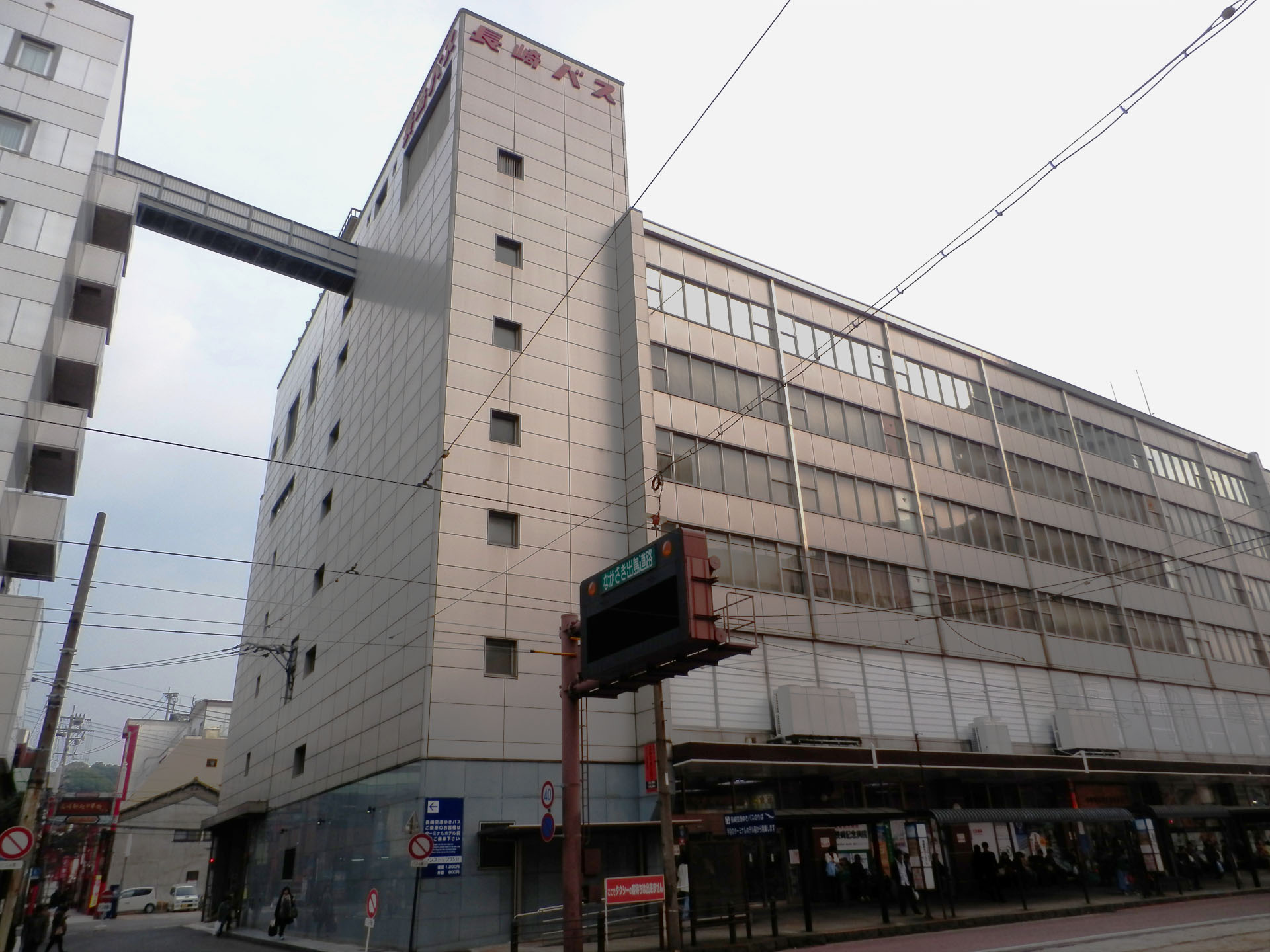 長崎新地ターミナル（長崎バス）